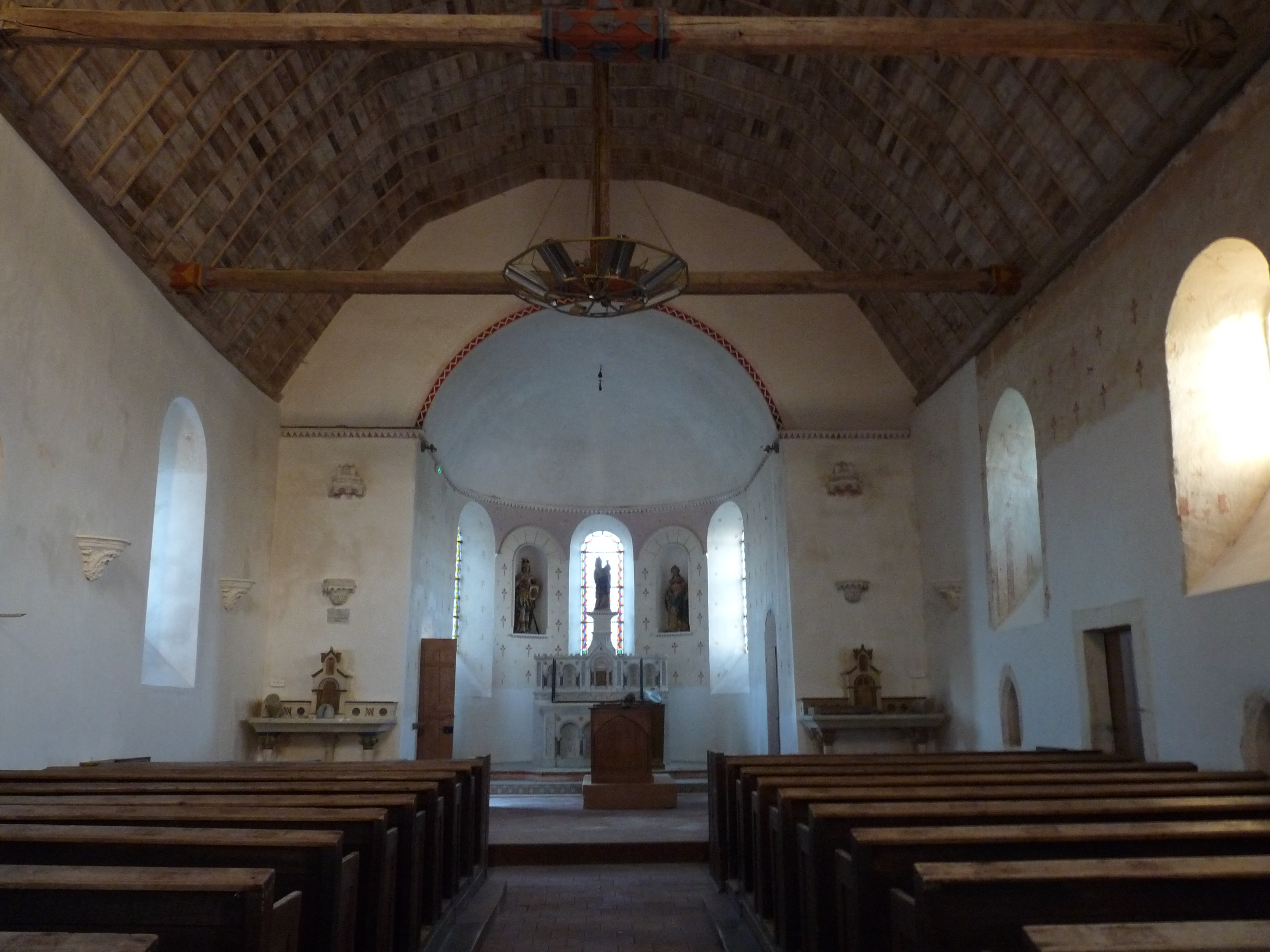 Chœur de l'église de Saint-Georges-du-Bois dans le département français de la Sarthe pendant les travaux en décembre 2009.